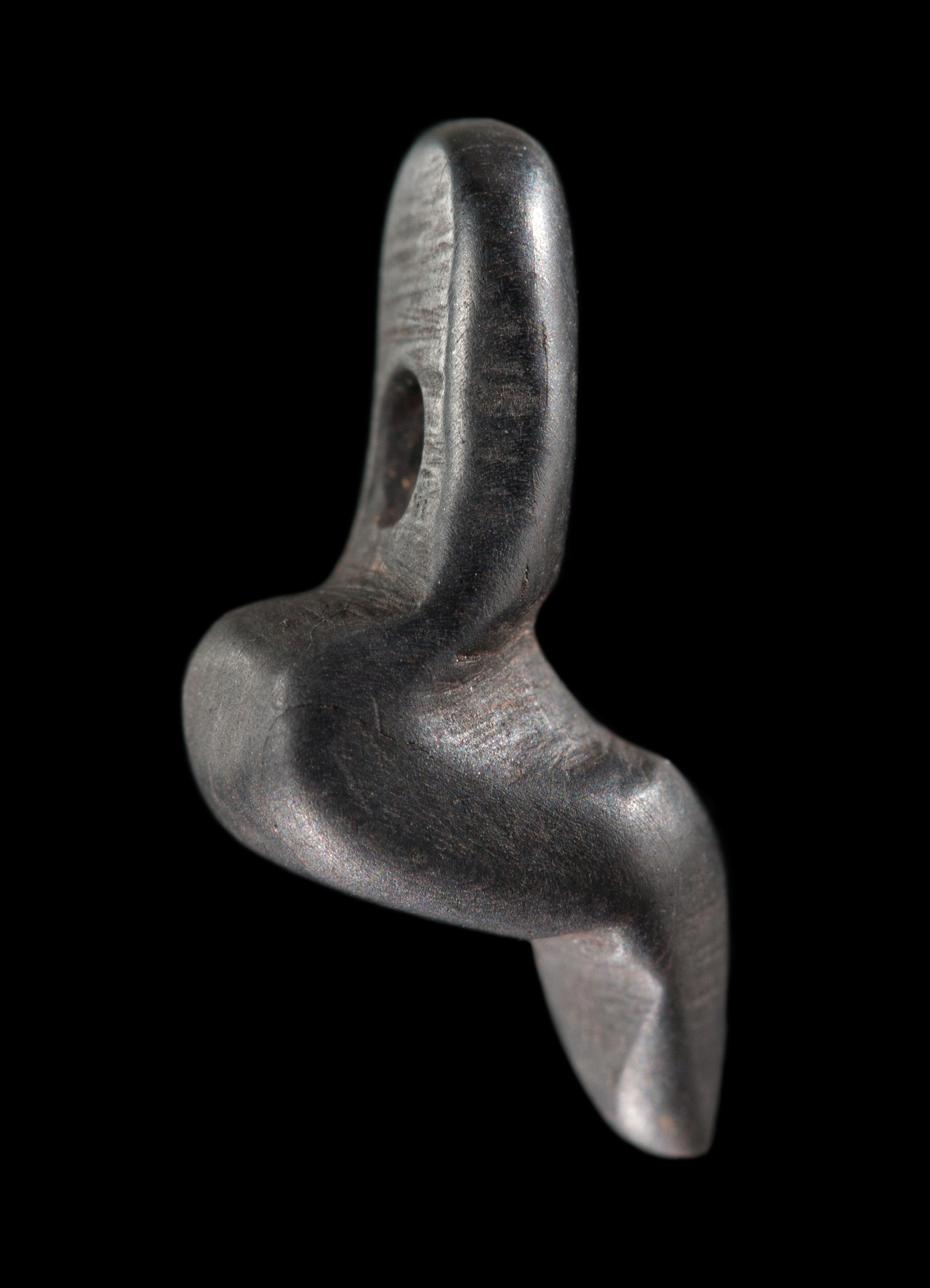 L'une des Vénus de Monruz, aussi appelée Dame de Monruz, est un élément de parure anthropomorphe de 1,5 cm datant du Magdalénien.